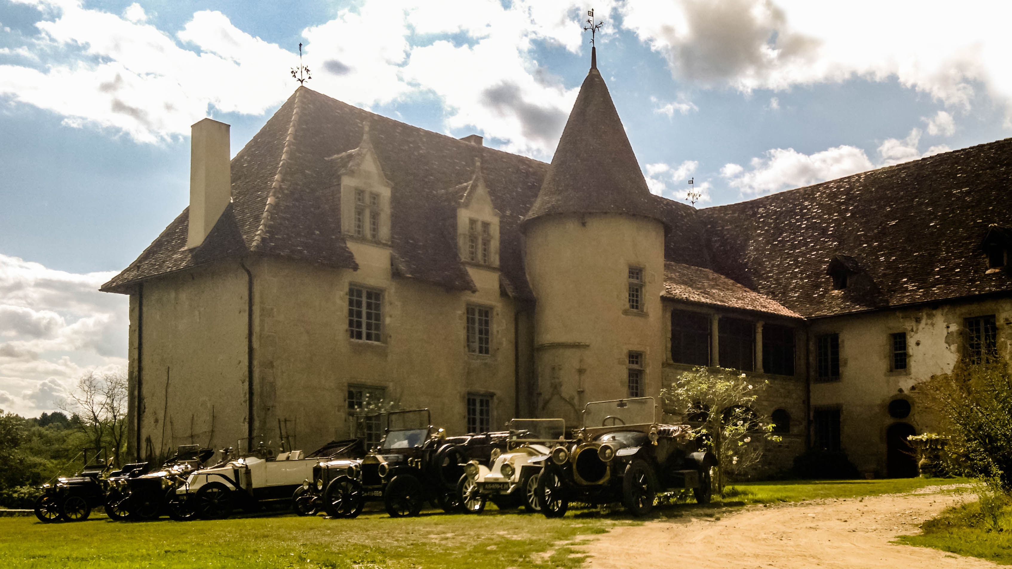 Château de Losmonerie le 02/09/2017 photo : Dimitri Ribeiro